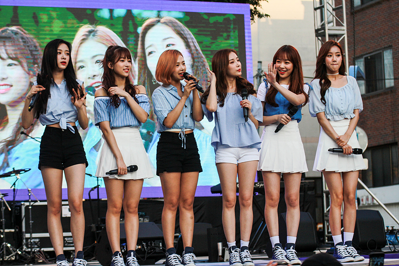 ✔일시 - 8.31(금) 오후 6시 ✔장소 - 홍대걷고싶은거리 (홍대입구역 4번출구) ✔라인업 - 데이브레이크, 소란, 에이프릴, 오리엔탈쇼커스 ✔제주항공X루나와 함께하는 K-POP 댄스리그 결승전 18시에 행사 시작인데 1시간전쯤 홍대역에 도착했습니다. 150석 정도의 좌석에 30여석 정도 빈자리가 남아있었는데 대부분 물병이나 가방 등으로 자리를 맡아놓은 것이었습니다. 18시가 조금 넘어 에이프릴(멤버 : 윤채경, 김채원, 이나은, 양예나, 레이첼, 이진솔) 공연으로 행사가 시작되었습니다. 20분정도의 공연이 끝나고 K-POP 댄스리그 결승전이 있었습니다. 커버댄스 공연이었는데 한팀이 여러개의 곡을 보여주었습니다. 에이티나인 EchoDance HK - 홍콩에서 온 팀이었습니다. HACKER crew ONOFF - 유일한 남자팀이었습니다. 댄스리그 결과및 나머지 공연도 못보고 돌아왔습니다. ^^ 상이 4개라서 전부 하나씩 받았을텐데 검색을 해도 에이티나인팀이 루나 뷰스타상을 받았다는 것 외에 다른 팀 결과를 찾기 어렵네요.